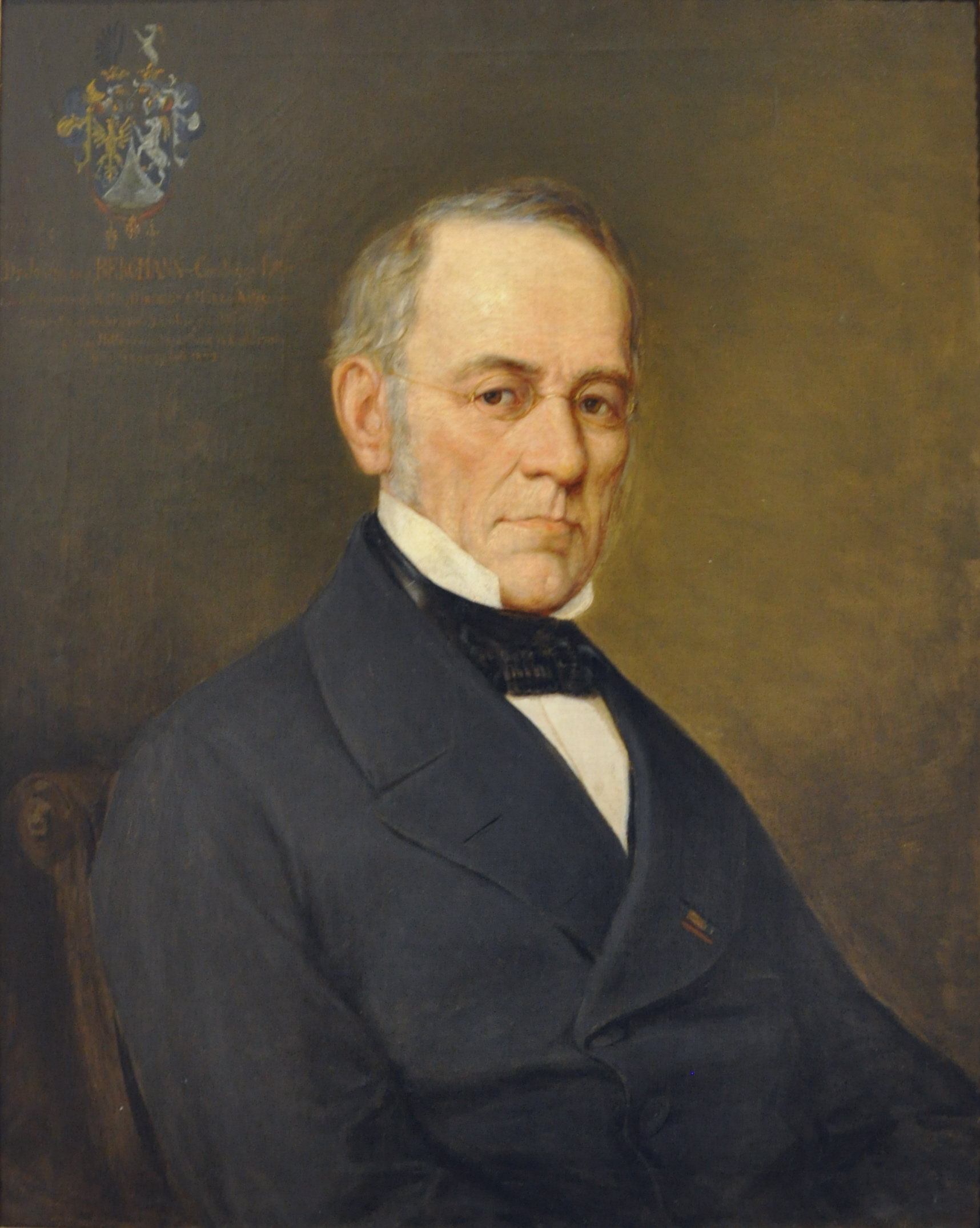 Bregenz, Vorarlberg Museum, Bildnis Dr. Joseph Ritter von Bergmann, laut Museum von „Ludwig Schnorr von Carolsfeld, nach 1872“ (Ludwig Ferdinand und Julius Schnorr von Carolsfeld passen nicht zu diesen Daten, eventuell ist ein anderer gemeint oder aber es liegt ein Versehen vor) Vorarlberg museum Native namevorarlberg museumLocationBregenz, Vorarlberg, AustriaCoordinates47° 30′ 15.84″ N, 9° 44′ 48.01″ E Established1857Web pageVorarlberg Museum websiteAuthority control : Q2533480 VIAF: 124091336 ISNI: 0000 0001 2242 622X LCCN: n50051186 GND: 18871-2 SUDOC: 030717523 WorldCat